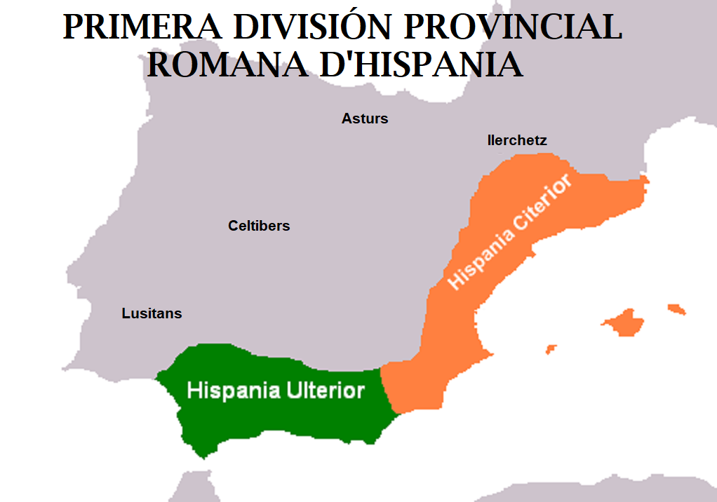 Aragonés: Primera división provincial romana d'Hispania